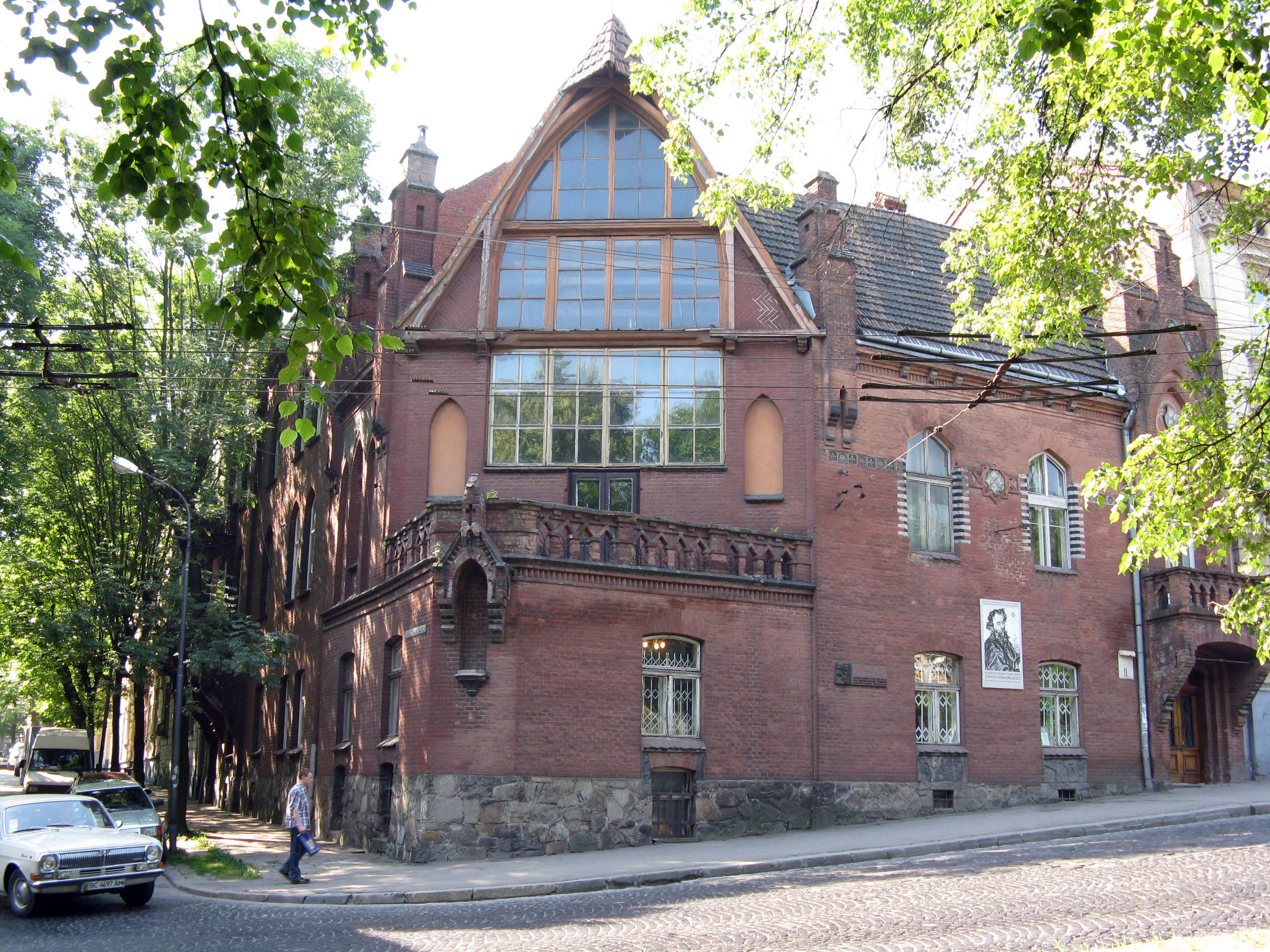 Музей Олекси Новаківського у Львові: У цьому будинку, збудованому на початку 20-го століття, мешкав Олекса Новаківський з родиною. Тепер тут його музей.